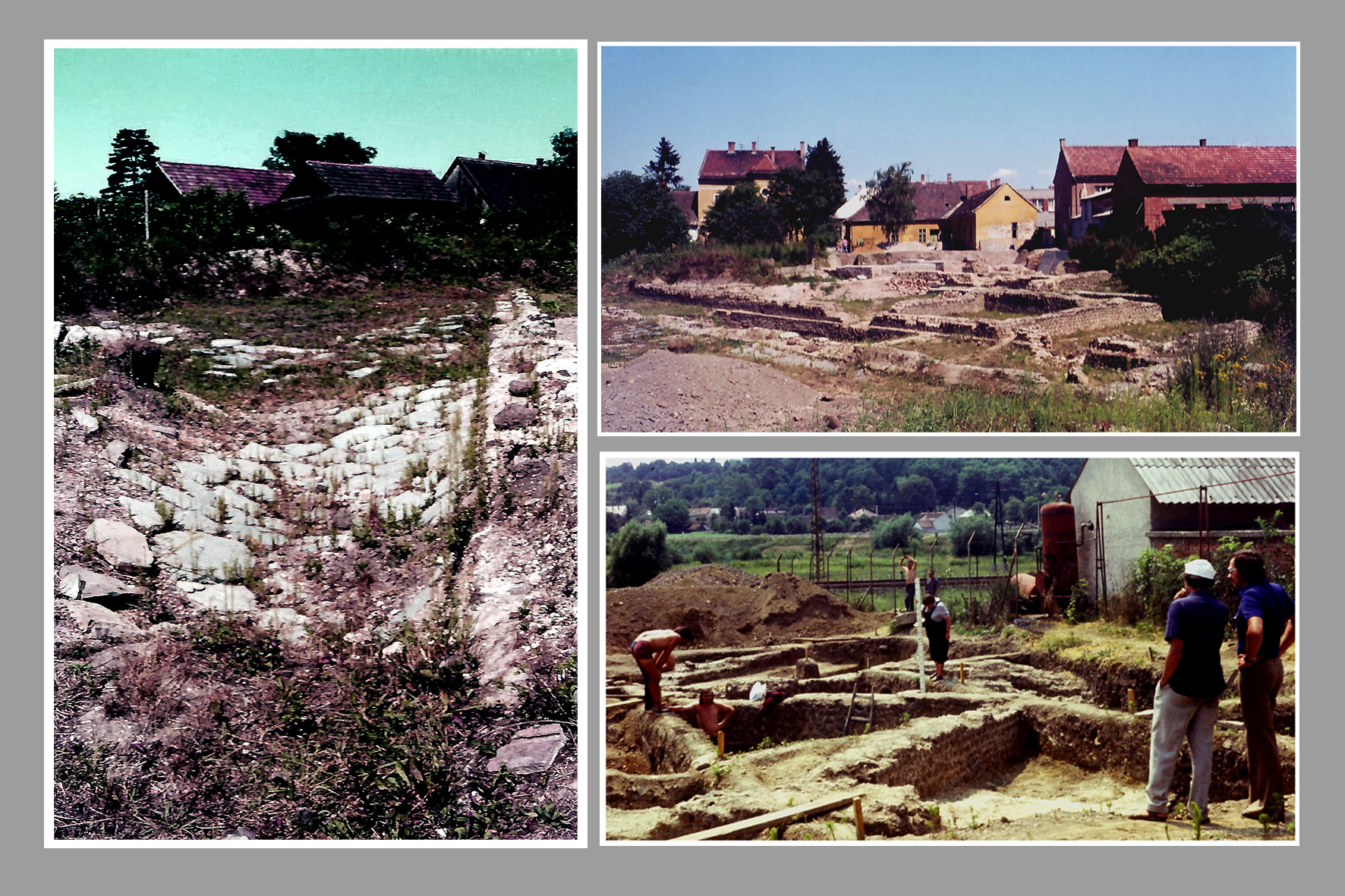 Zalalövő (Municpium Salla): régészeti feltárás (Balra: A borostyánkő-út részlete; jobbra felül: az építményromok jobbra alul: a szerző a feltárást vezető Mócsy Andrással)